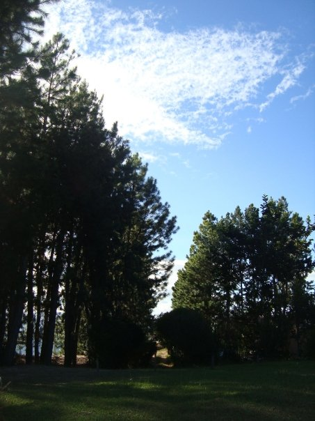 Rancho Abu Hanna al norte de Turmero, estado Aragua - Venezuela